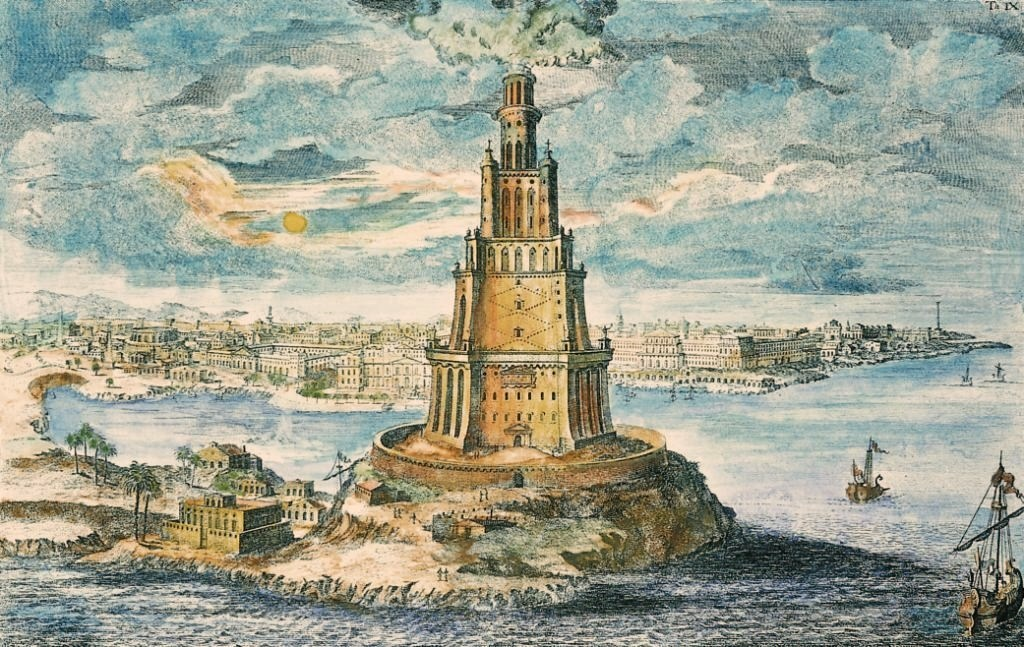 Gravure imaginant le Phare d'Alexandrie (Égypte). Tirée de l'ouvrage Entwurf einer historischen Architektur de Johann Bernhard Fischer von Erlach.